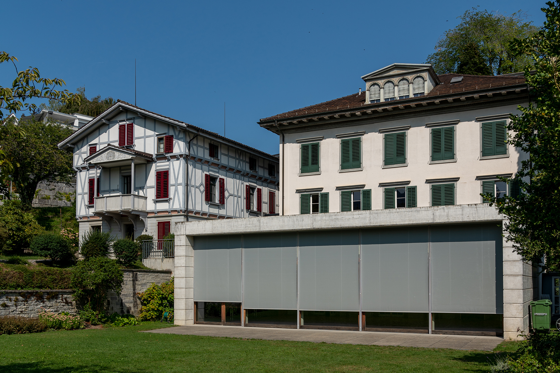 Reformiertes Kirchgemeindehaus und Sekretariat in der Anlage "Zum Rosengarten" in Richterswil (ZH)